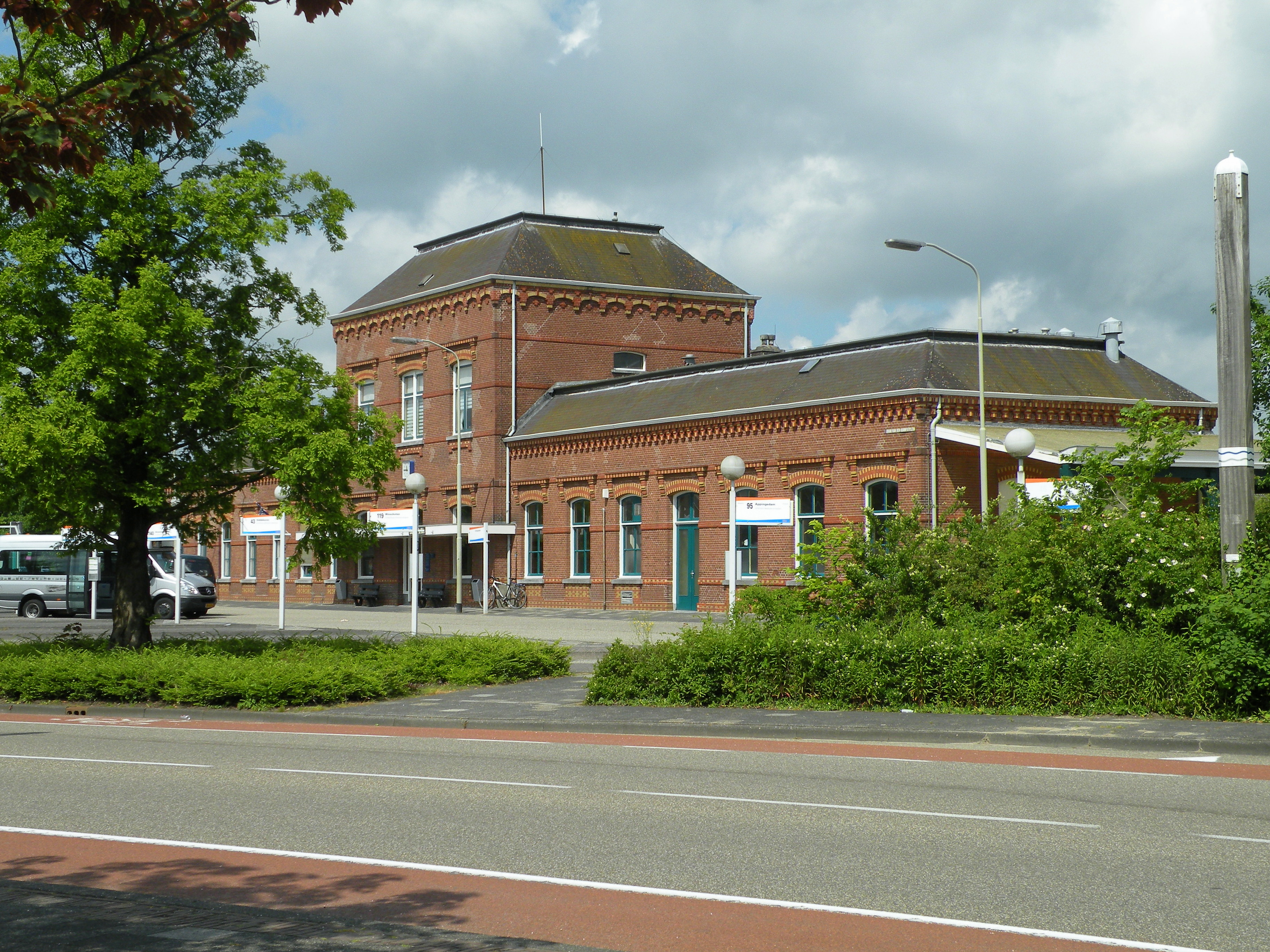 Delfzijl, station (1) RM-352059